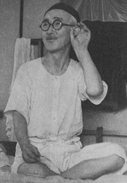 秋田雨雀